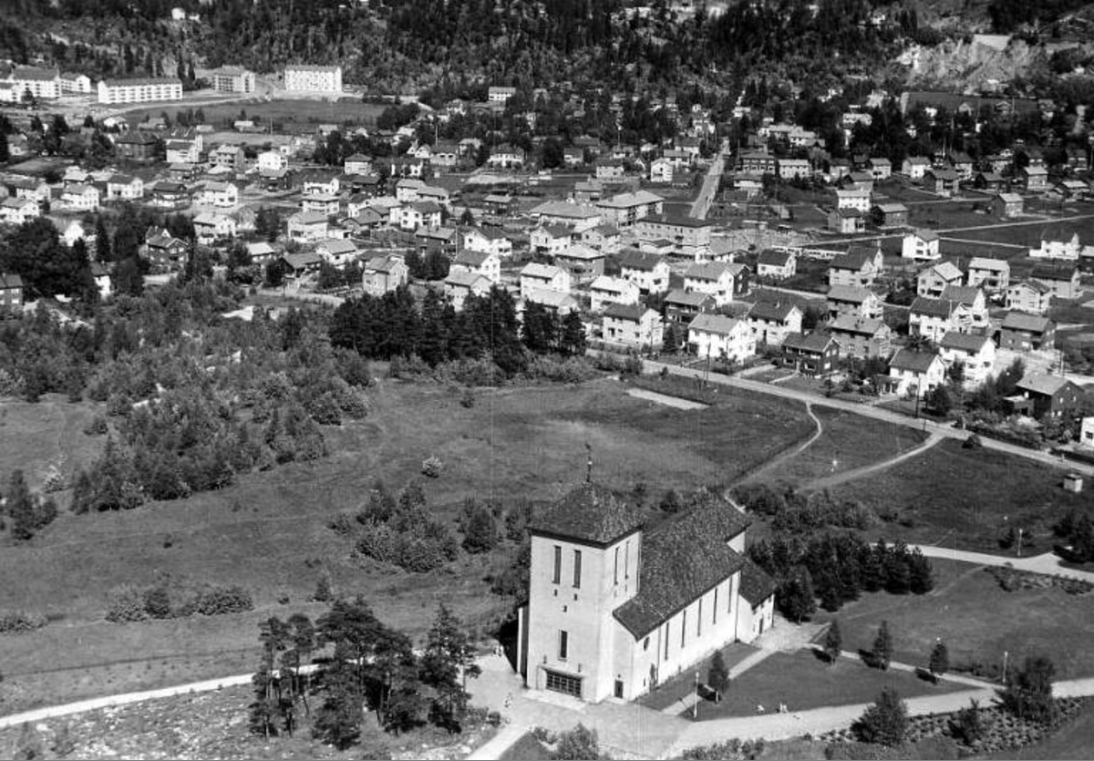 Grefsen kirke med Grefsenplatået bak, 1954